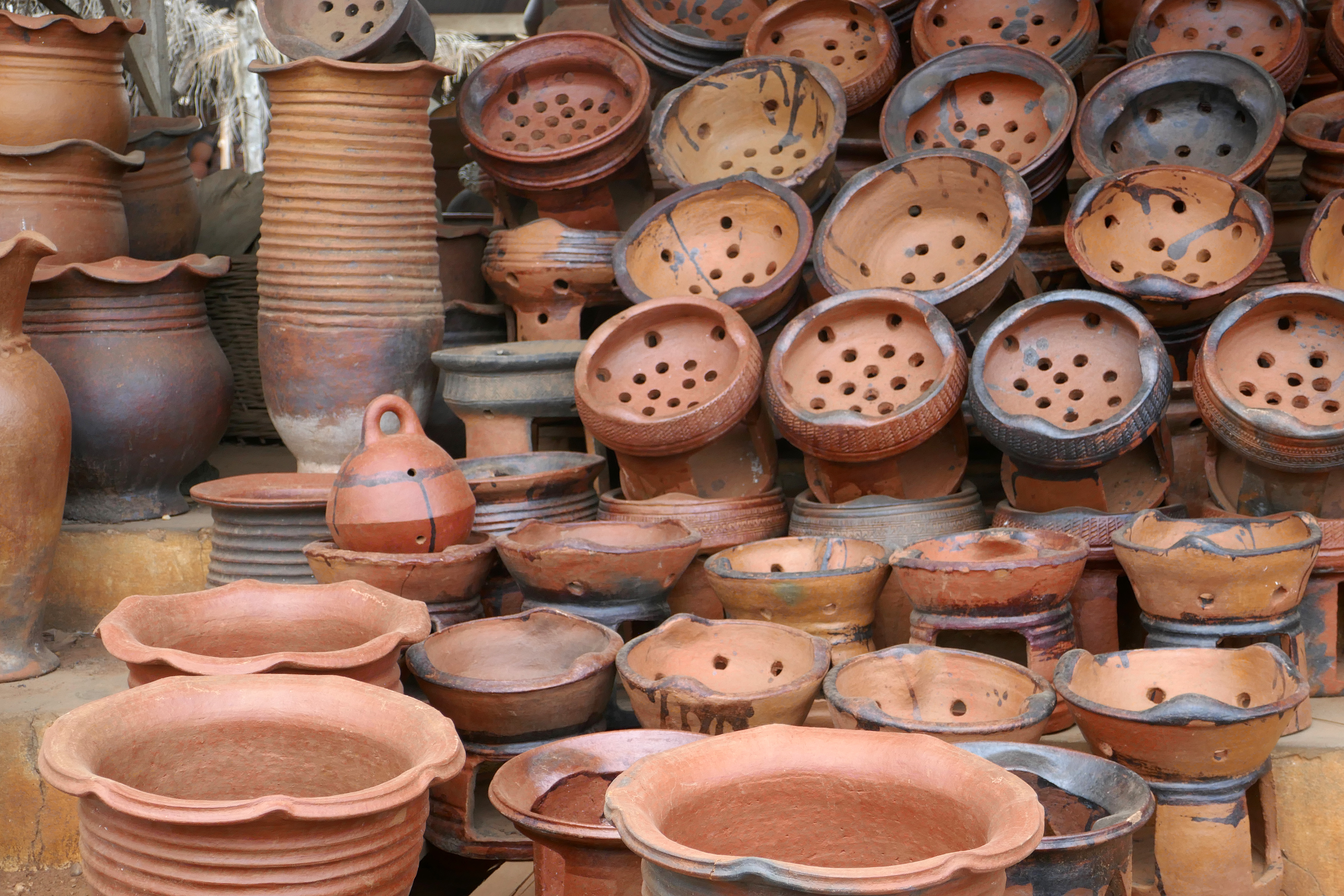 Vente de poterie à Sè (commune de Houéyogbé, Mono, Bénin).